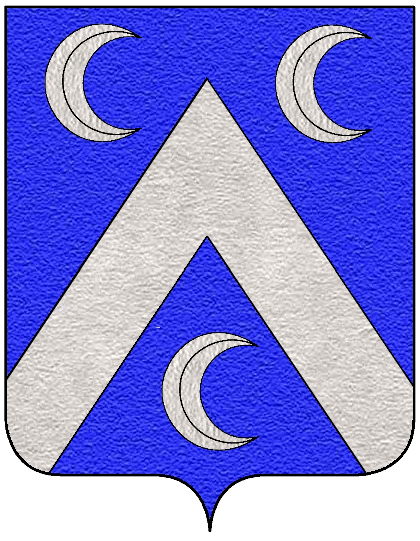 Stemma della famiglia Arduini